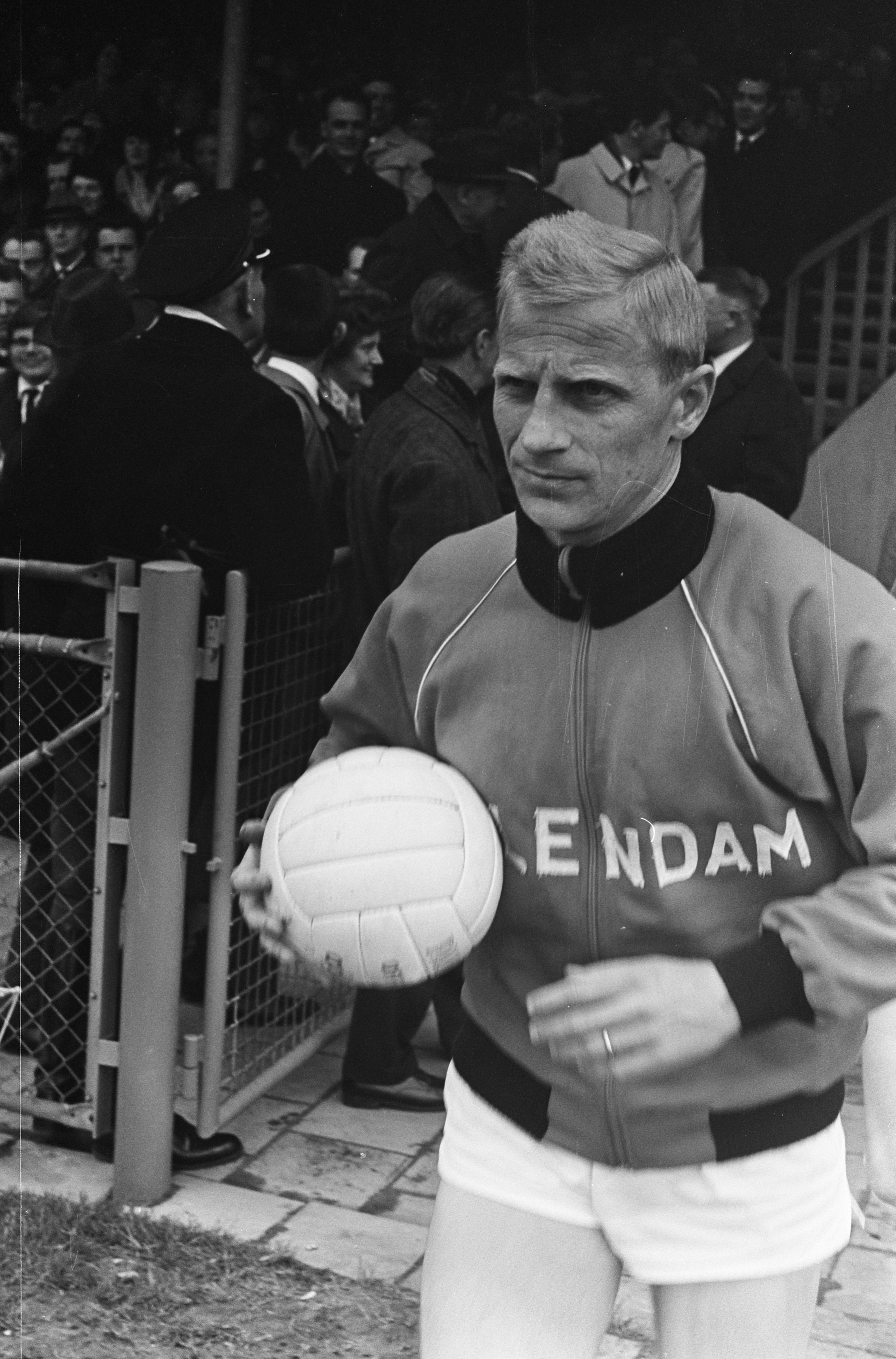 Photographie du footballeur Dick Tol par Ben Merk / Anefo (Volendam, 1967).